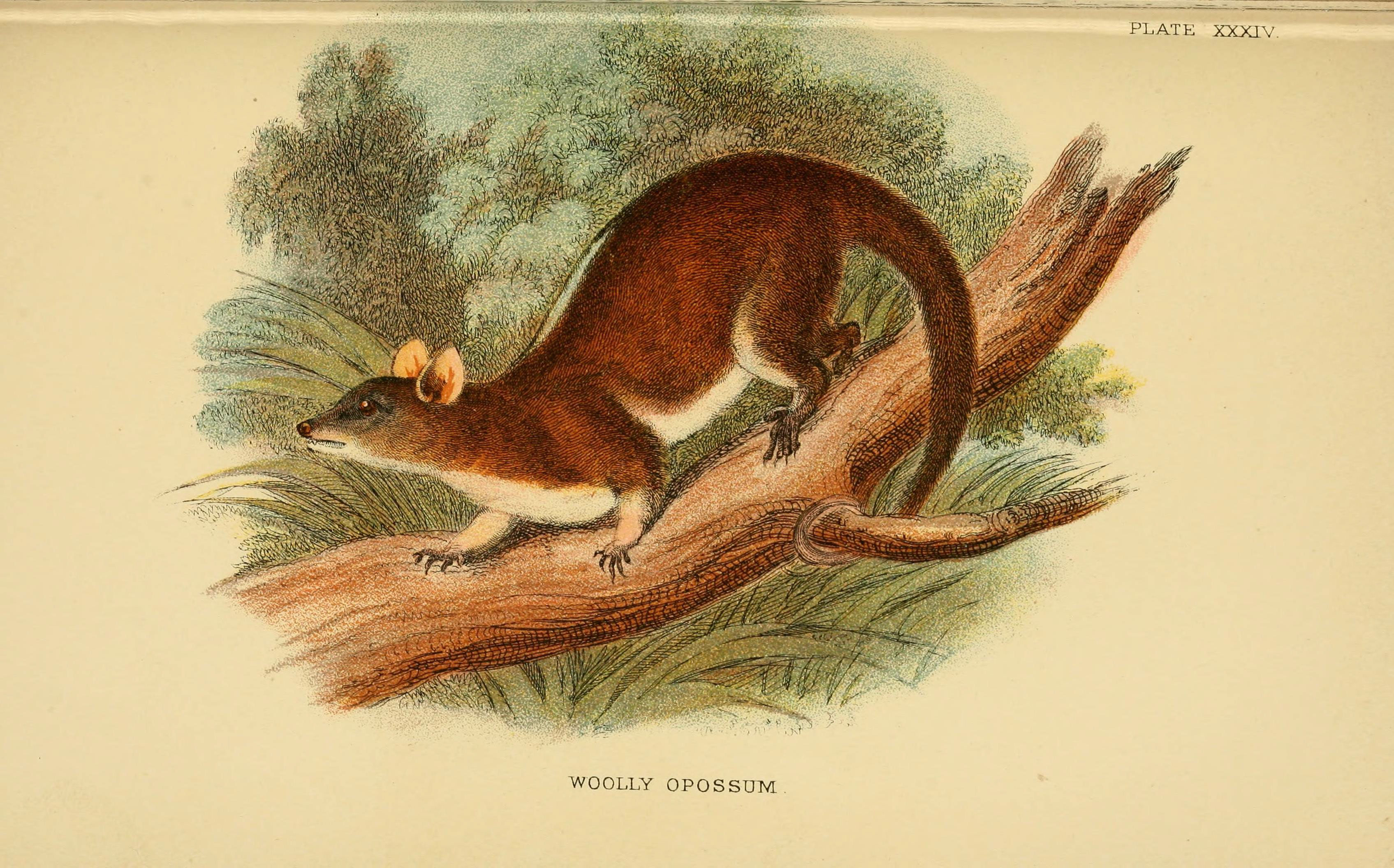 p CO O Pi o o o